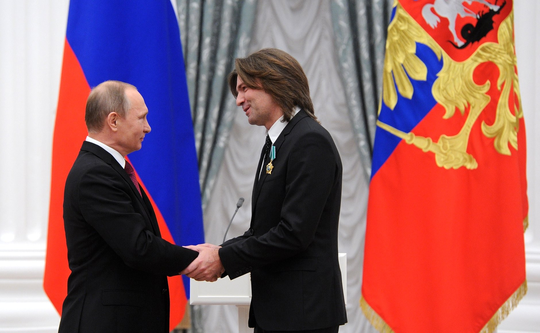 На церемонии вручения государственных наград Российской Федерации. Орденом Дружбы награждён певец и композитор Дмитрий Маликов.